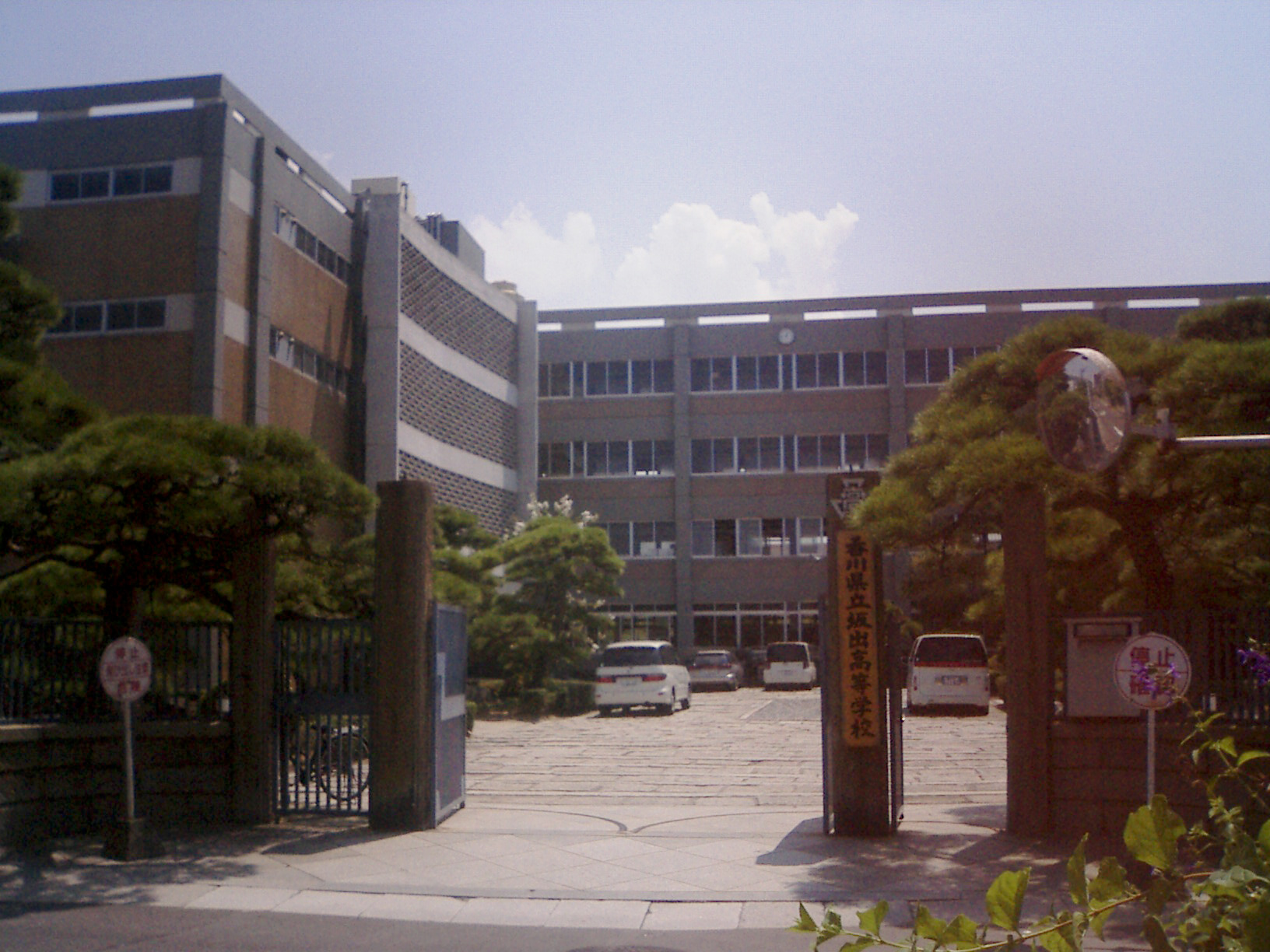 香川県立坂出高等学校 - 日本国香川県坂出市にある高等学校。